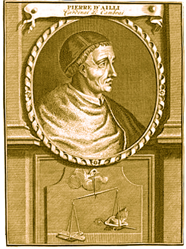 Cardinal Pierre d'Ailly, obédience antipape Jean XXIII